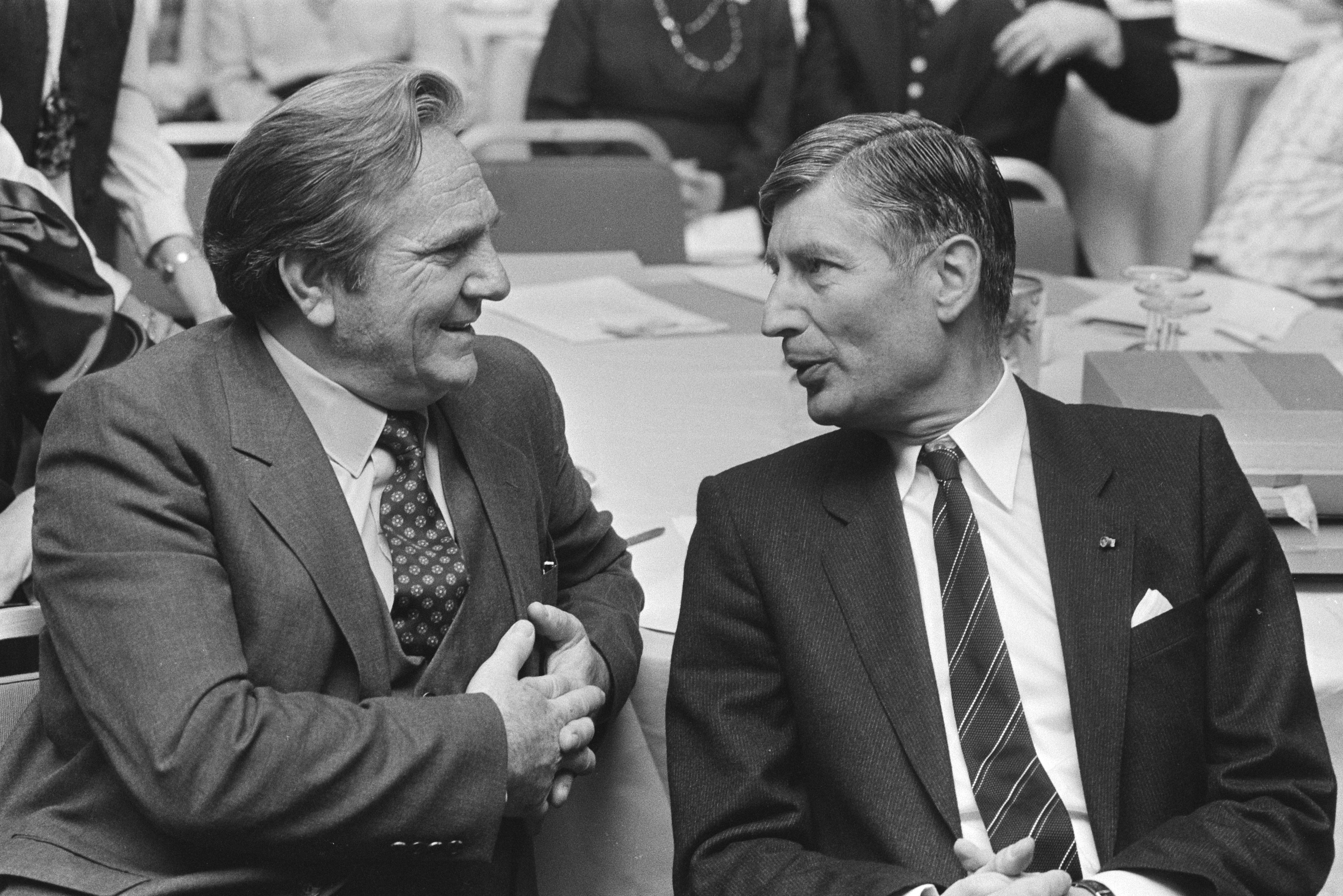 Collectie / Archief : Fotocollectie Anefo Reportage / Serie : Symposium "Zionisme als antwoord" van het CIDI (Centrum voor Informatie en Documentatie Israel) in het Hilton Hotel in Amsterdam Beschrijving : Israëlische ambassadeur Jacov Nechisthan (l) en premier Van Agt Annotatie : Randnummers negatiefstrook: nr. 27, 28 Dr. Simon Wiesenthal, 29 Datum : 18 oktober 1982 Locatie : Amsterdam, Noord-Holland Trefwoorden : ambassadeurs, premiers, symposia Persoonsnaam : Wiesenthal, Simon Fotograaf : Bogaerts, Rob / Anefo Auteursrechthebbende : Nationaal Archief Materiaalsoort : Negatief (zwart/wit) Nummer archiefinventaris : bekijk toegang 2.24.01.05 Bestanddeelnummer : 932-3672